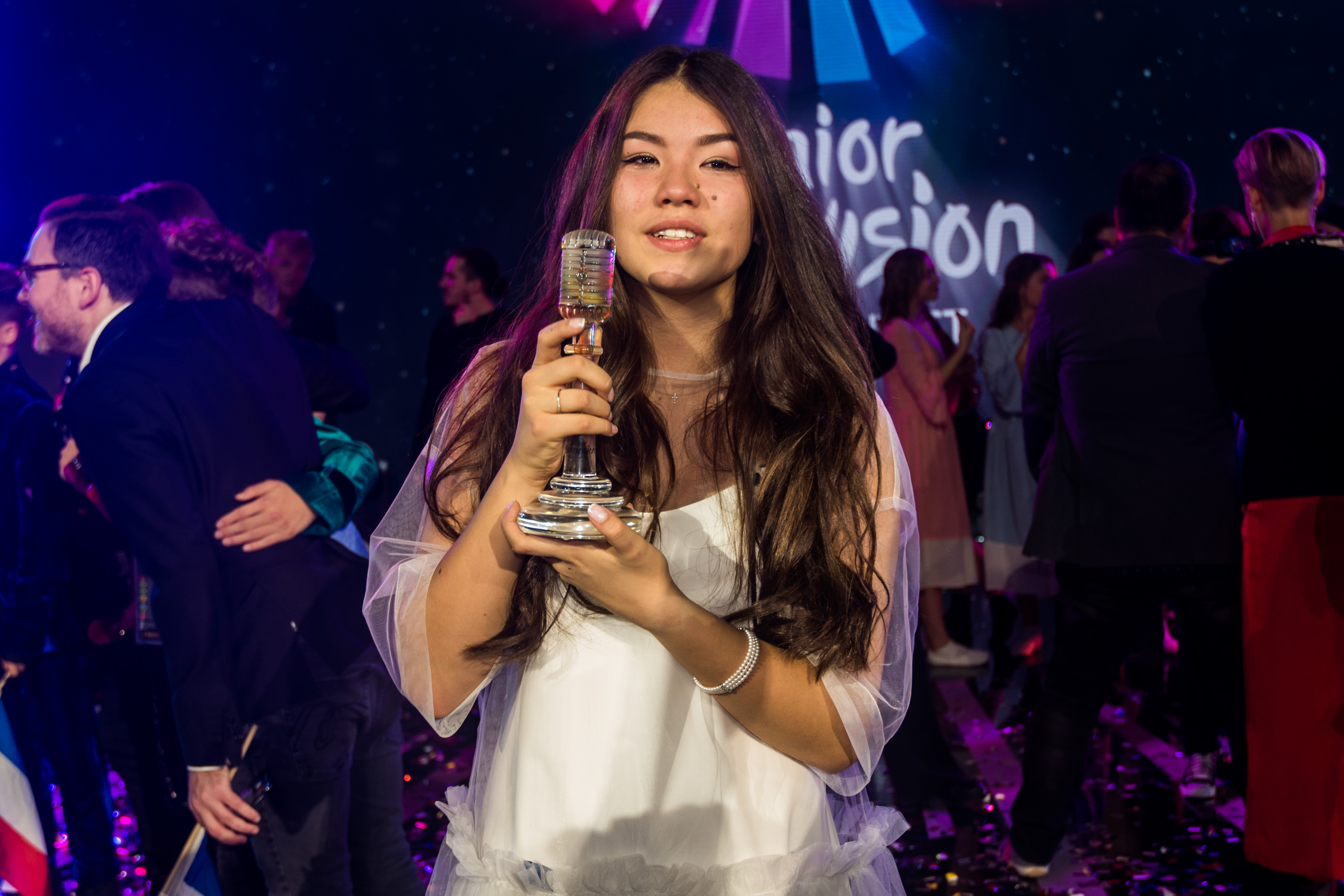 Полина Богусевич с призом Детского Евровидения 2017